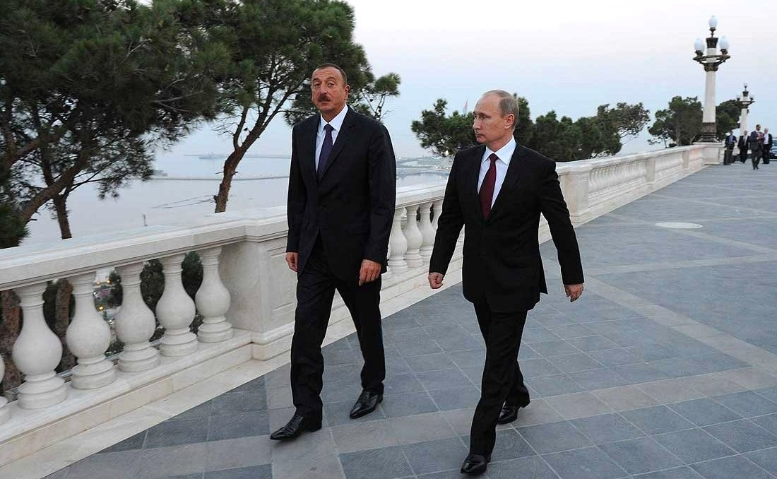 С Президентом Азербайджана Ильхамом Алиевым во время прогулки по Баку.